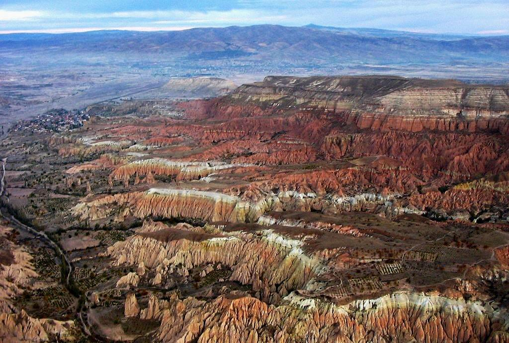 Kappadókia/Göreme Nemzeti Park: a táj légballonból (Törökország)